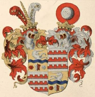 Krüdeneri suguvõsa aadli- ja parunivapp